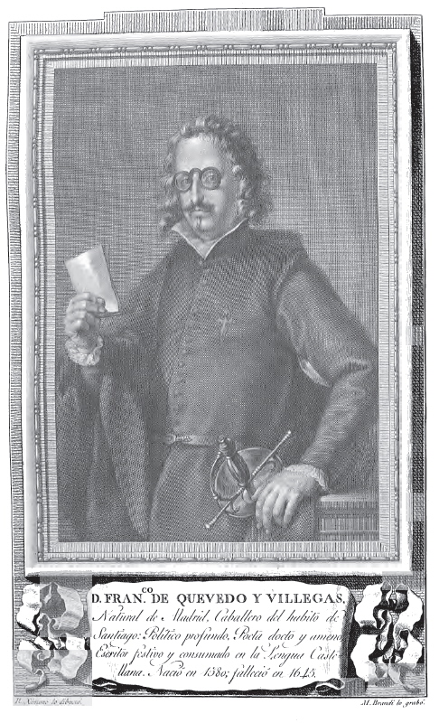 Retrato de Francisco de Quevedo y Villegas (1580-1645).